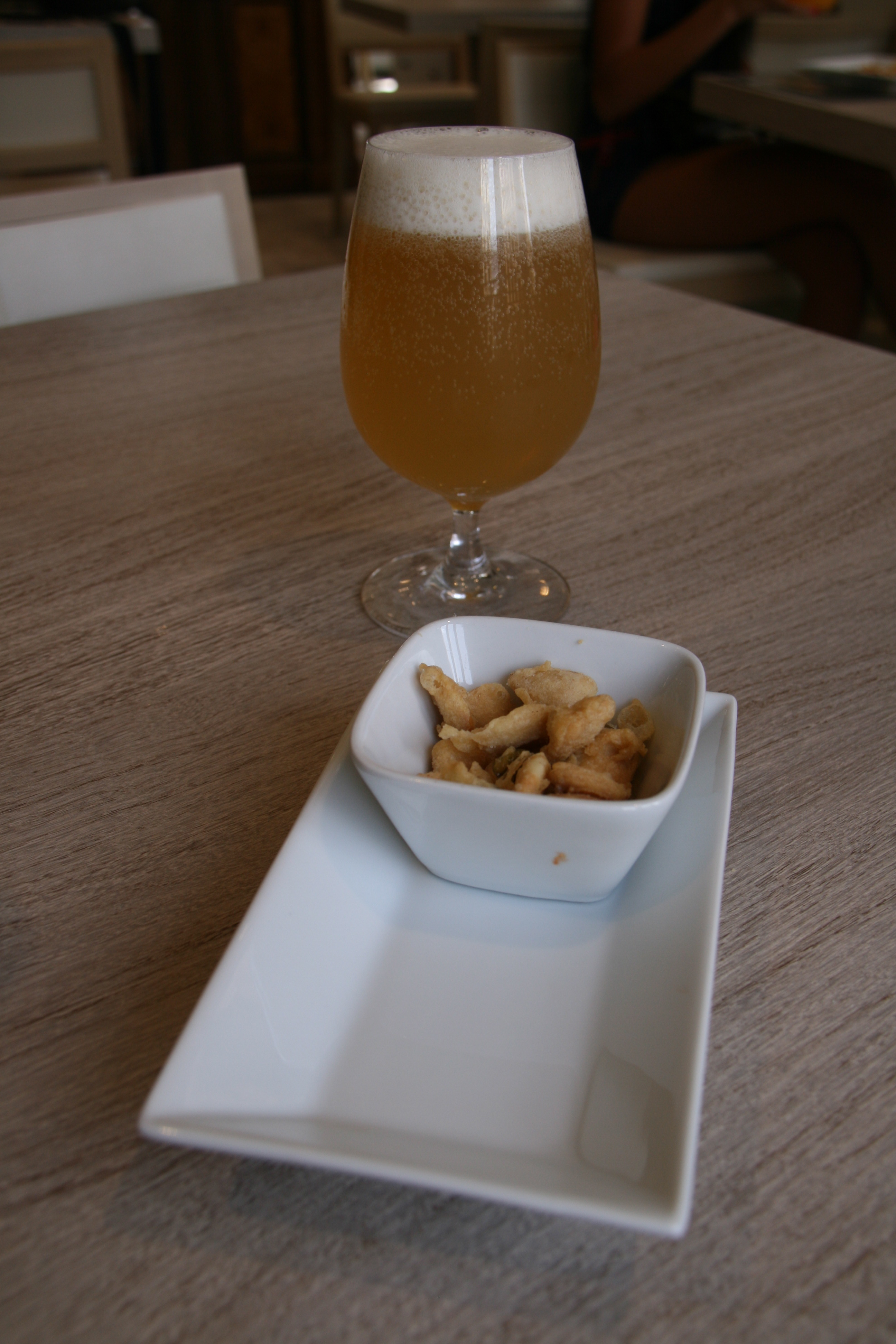 Clara (Cerveza con Gaseosa) - Acompañada de frutos secos